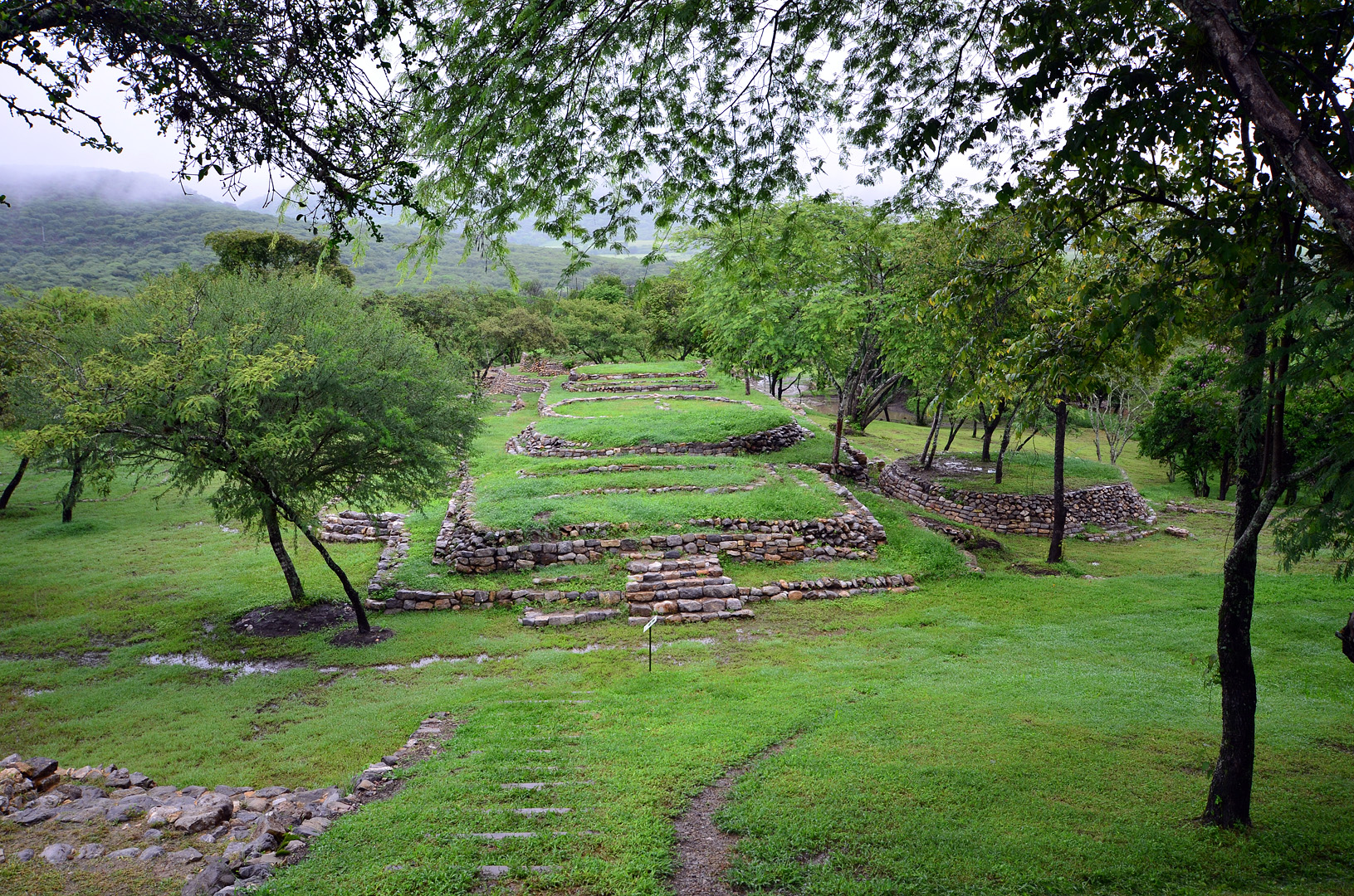 Tancama